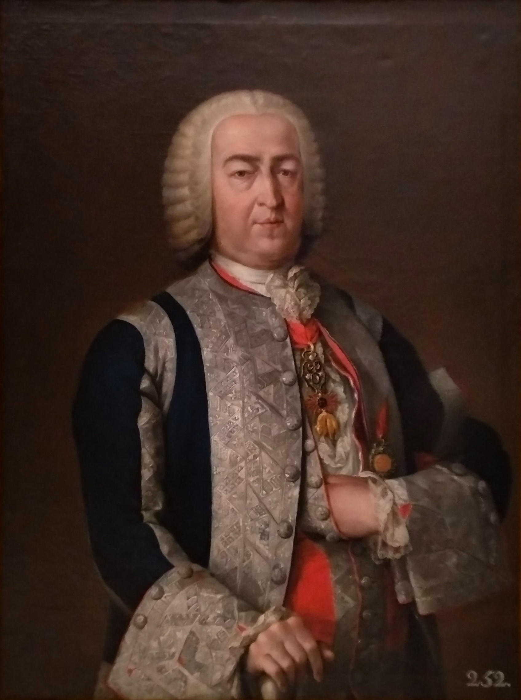 Bernardo Martínez del Barranco, Retrato del marqués de Sarria, óleo sobre lienzo, 103 x 77 cm, Madrid, Real Academia de Bellas Artes de San Fernando.